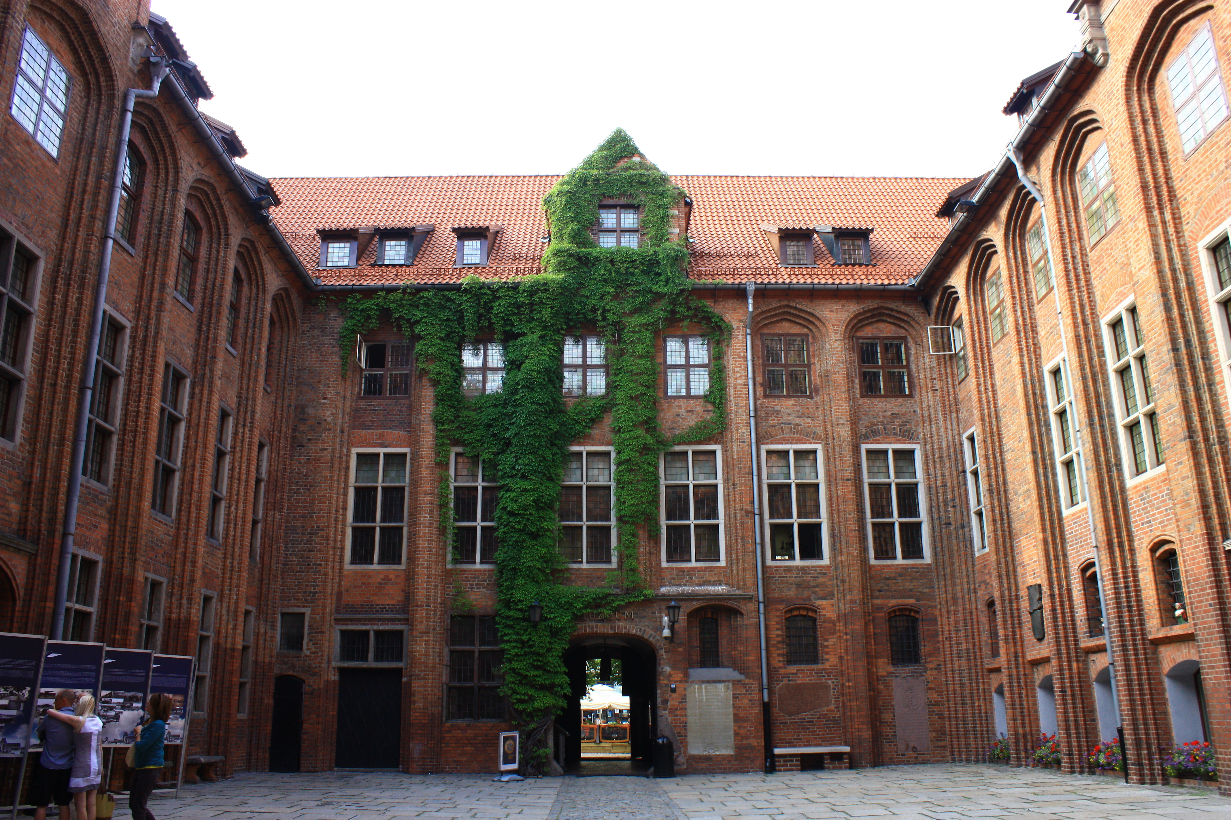 Toruń, ratusz staromiejski, ob. Muzeum Okręgowe, 2 poł. XIII, 1391-1399, 1861